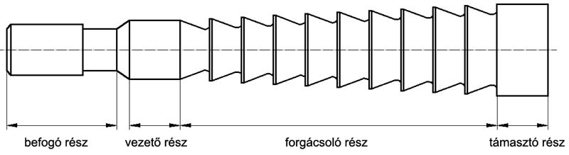 Húzótüske felépítése